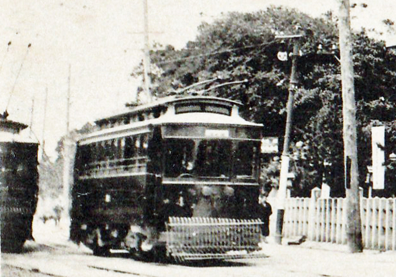 住吉鳥居前の阪堺電気軌道１形電車４号。